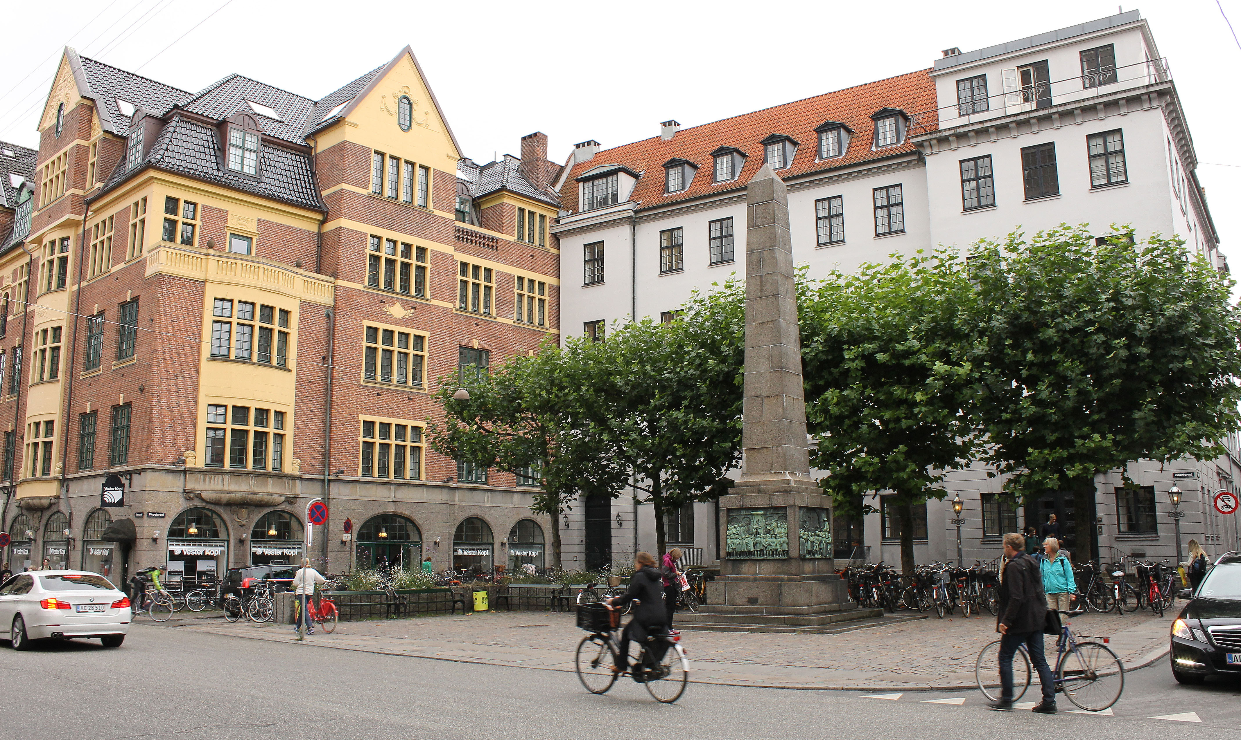 Bispetorv in Copenhagen, Denmark